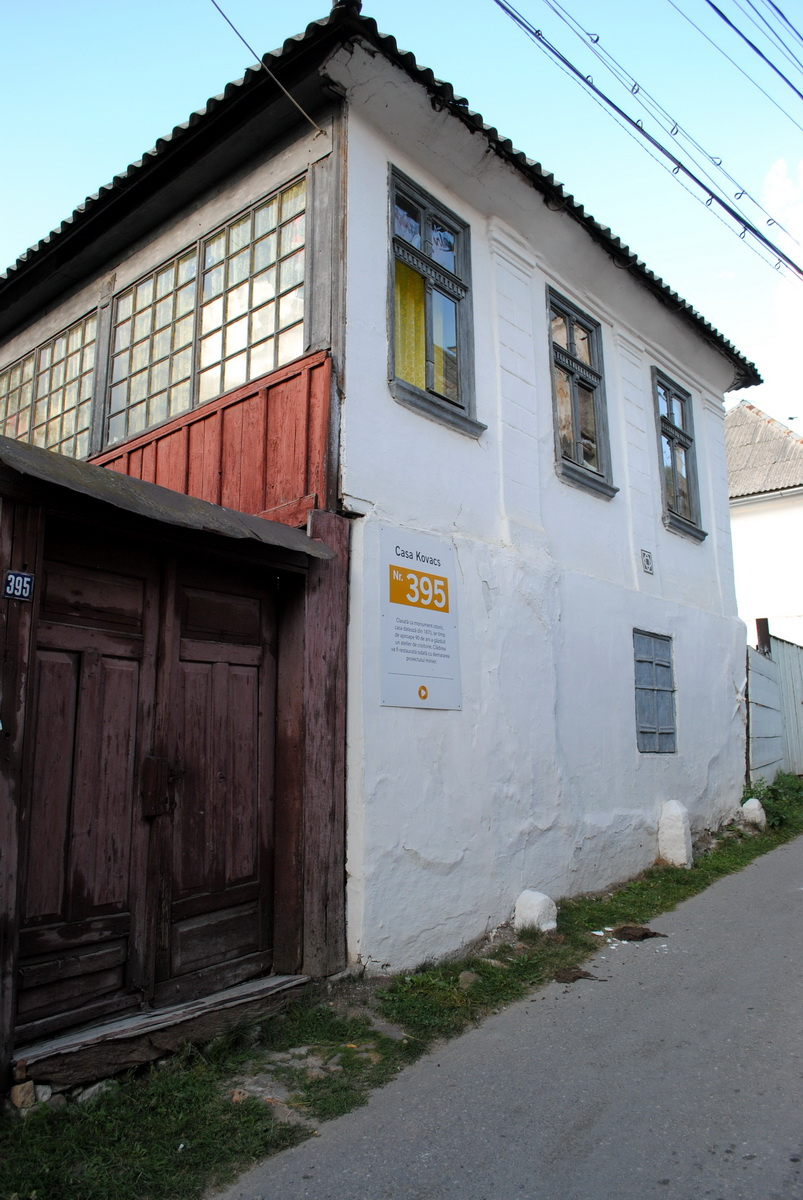 Casă veche